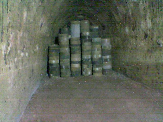 Chenyun摄于景德镇的一个示范作坊 烧瓷器的窑 诺基亚手机6600 2005-8-23